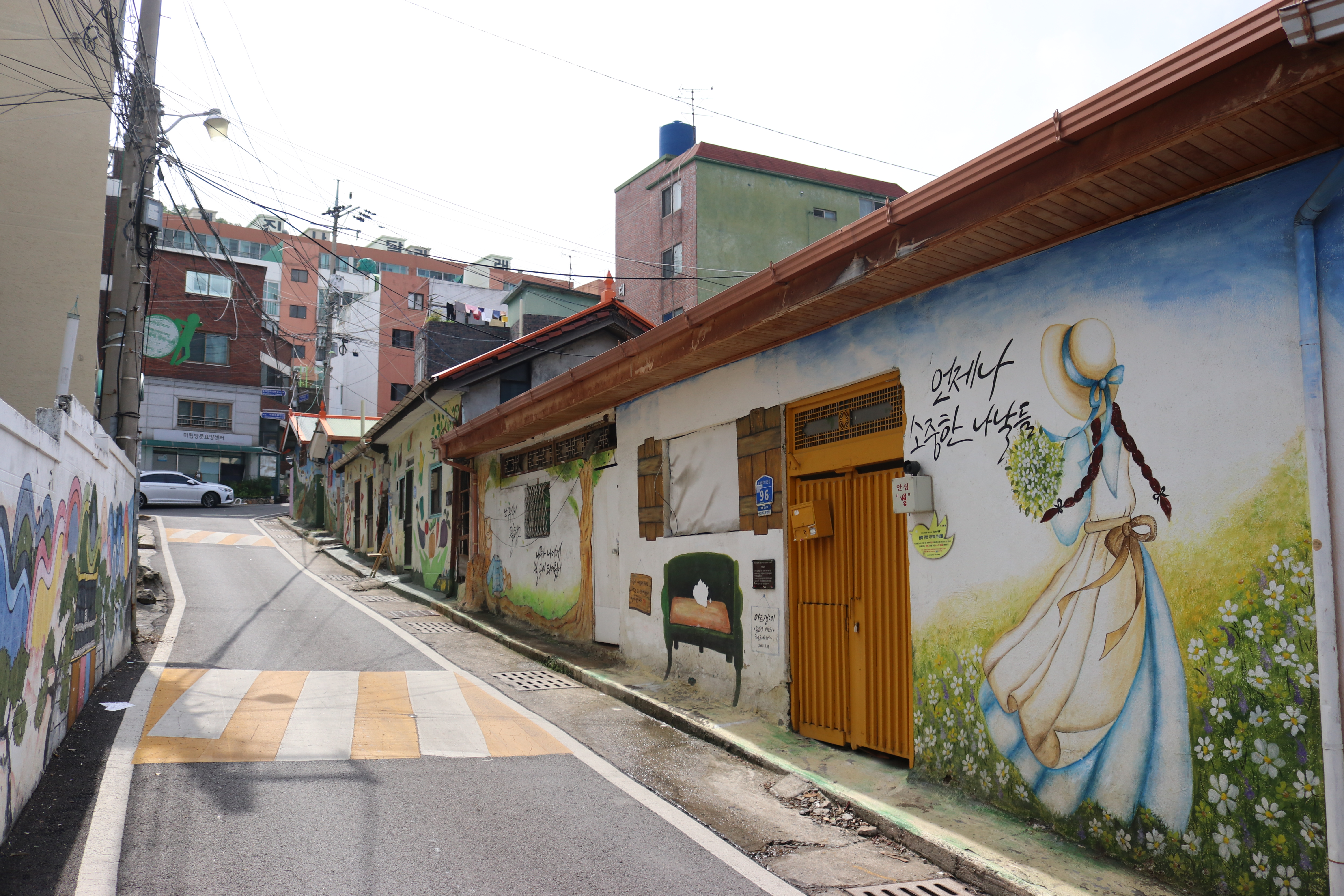 대전시에 위치한 대동벽화마을 모습